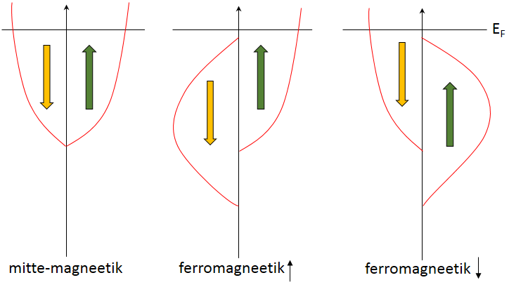 Ferromagneetikute elektronasustus